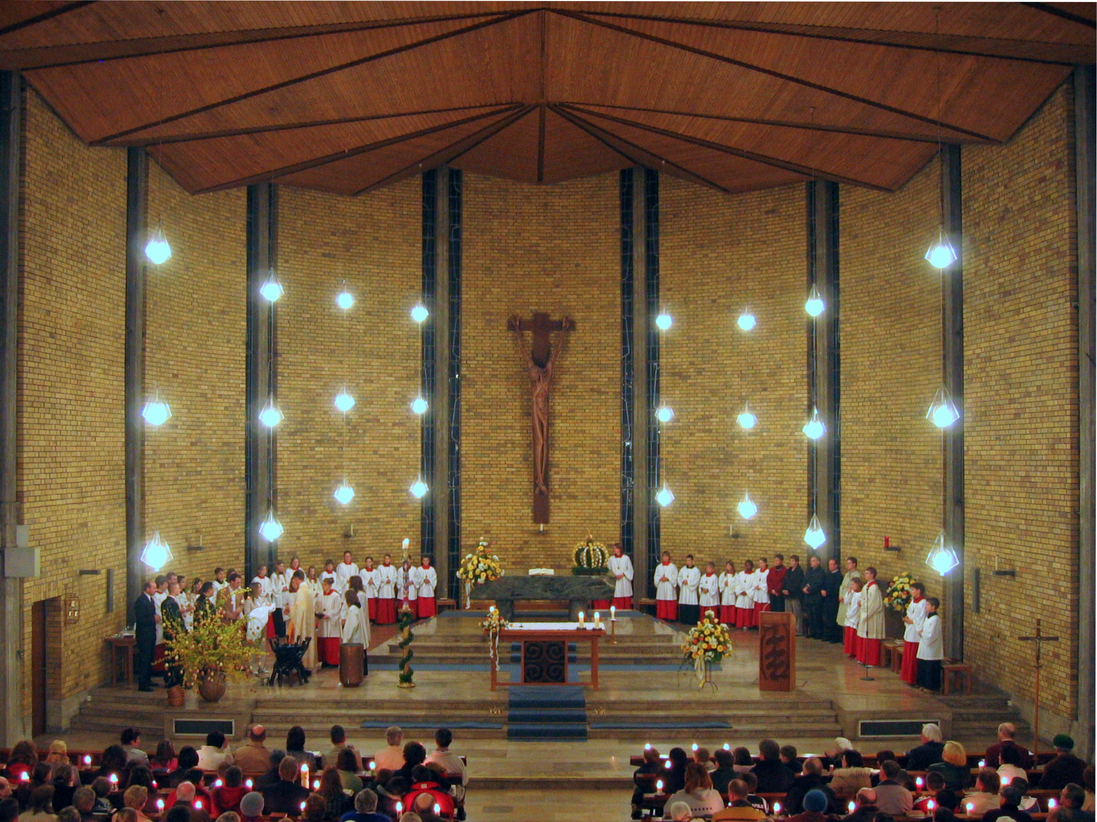 Innenraum der katholischen Kirche St. Joseph in Öhringen, Gottesdienst in der Osternacht